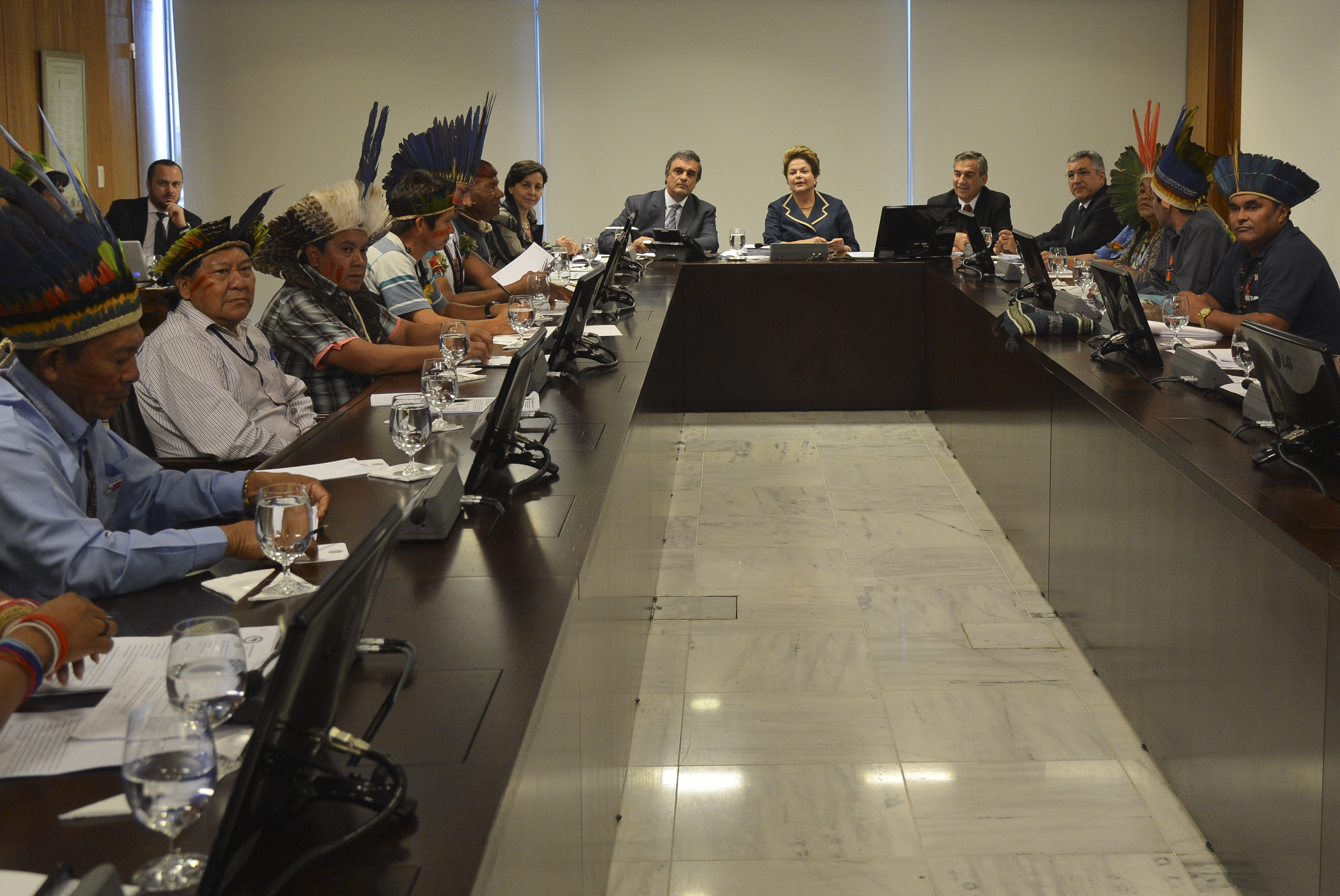 Brasília - A presidente Dilma Rousseff se reúne com representantes dos povos indígenas, no Palácio do Planalto.